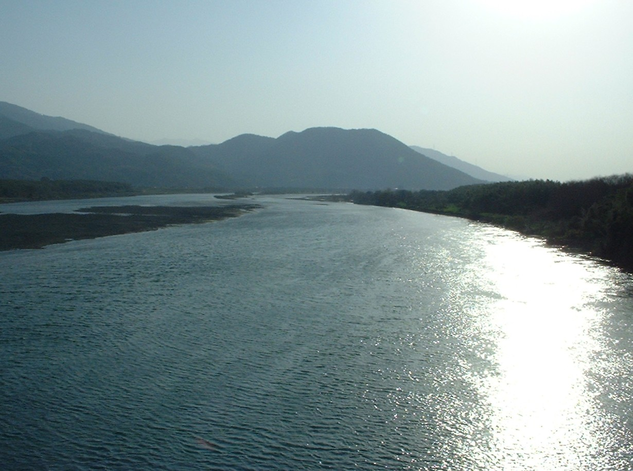 中流域、阿波郡阿波町（現・阿波市）と吉野川市との間にかかる瀬詰大橋から西望 2005年3月30日 Bakkai撮影 Category:徳島県の河川画像